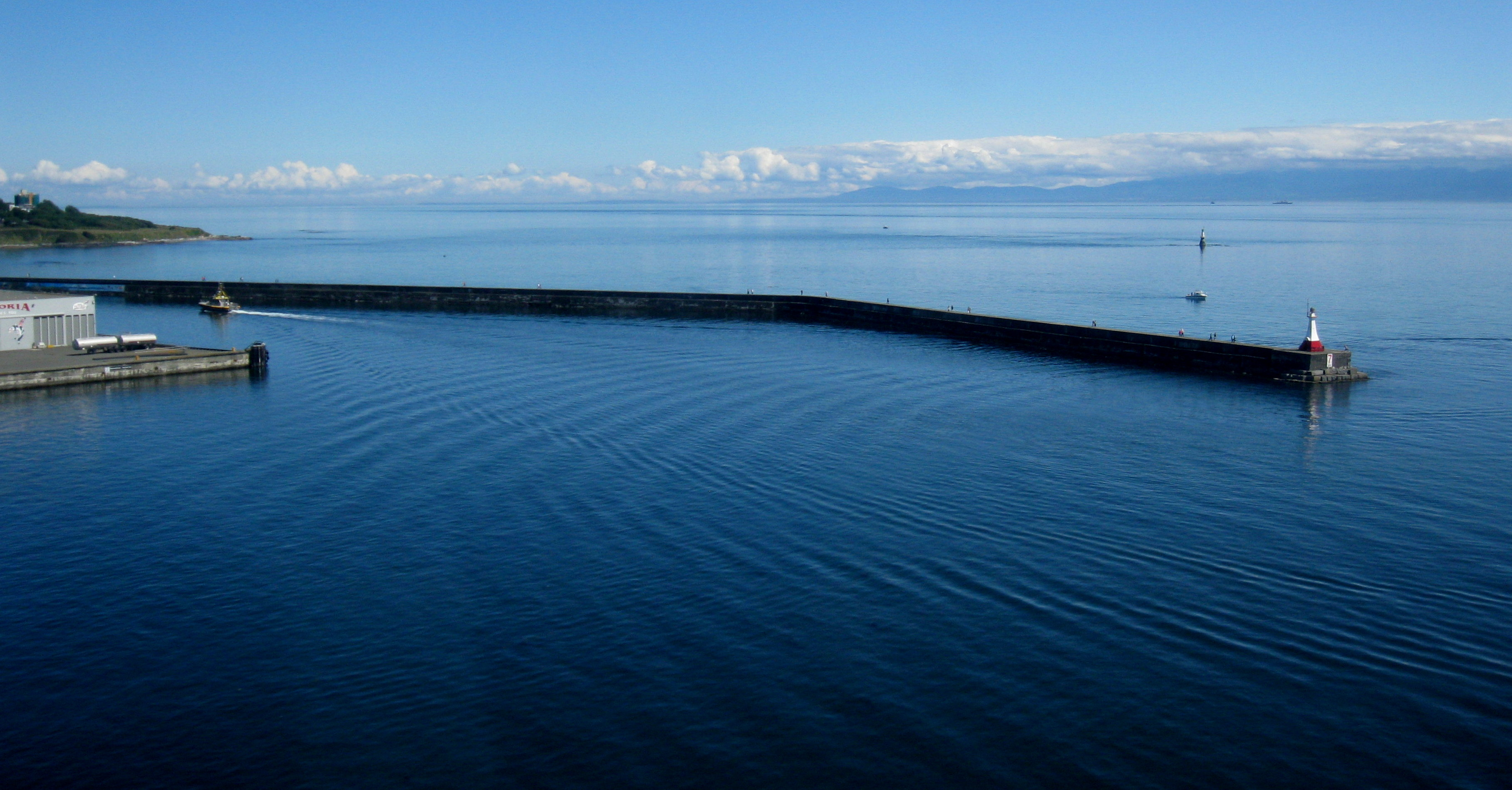 Ogden Point. MORE INFO IN PANORAMIO/DESCRIPTION